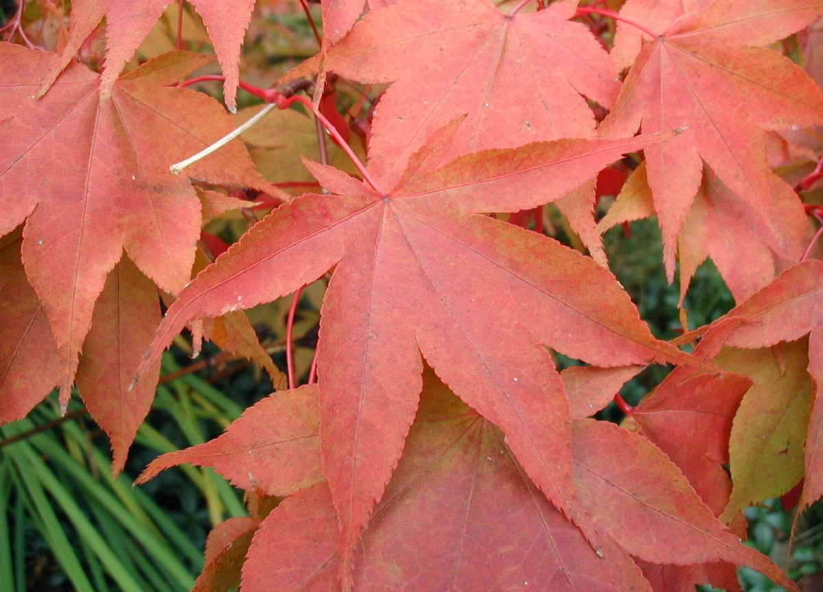 Acer palmatum: Autumn-coloured leaves. (Cv. 'Osakazuki')